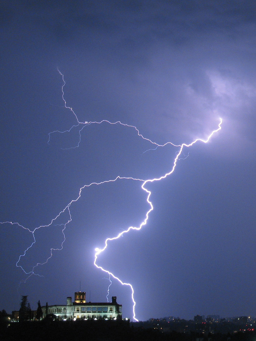 Tormenta eléctrica al poniente de la Ciudad de México | Lightning over Mexico City